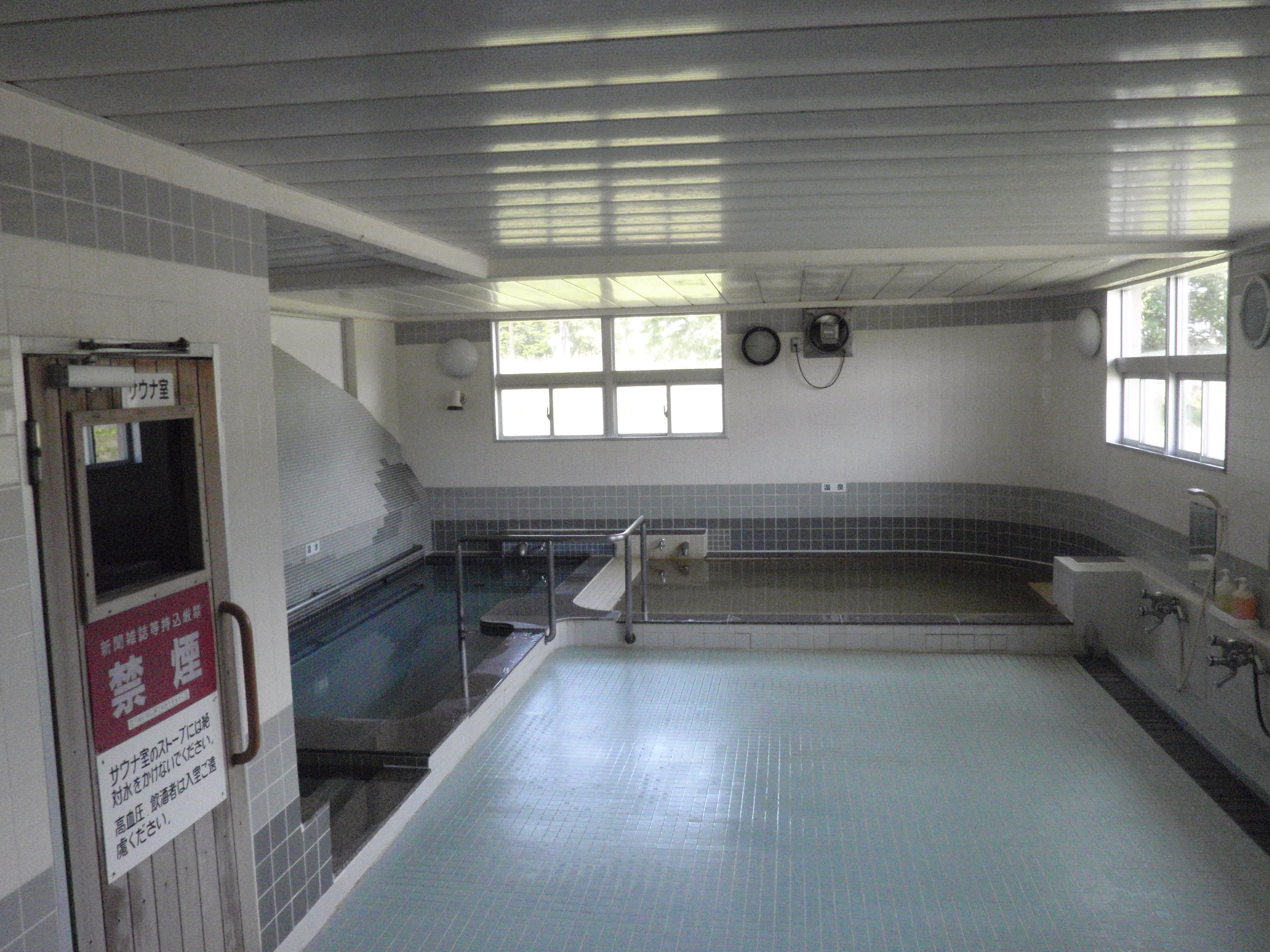 ピンネシリ温泉、望岳荘、内湯